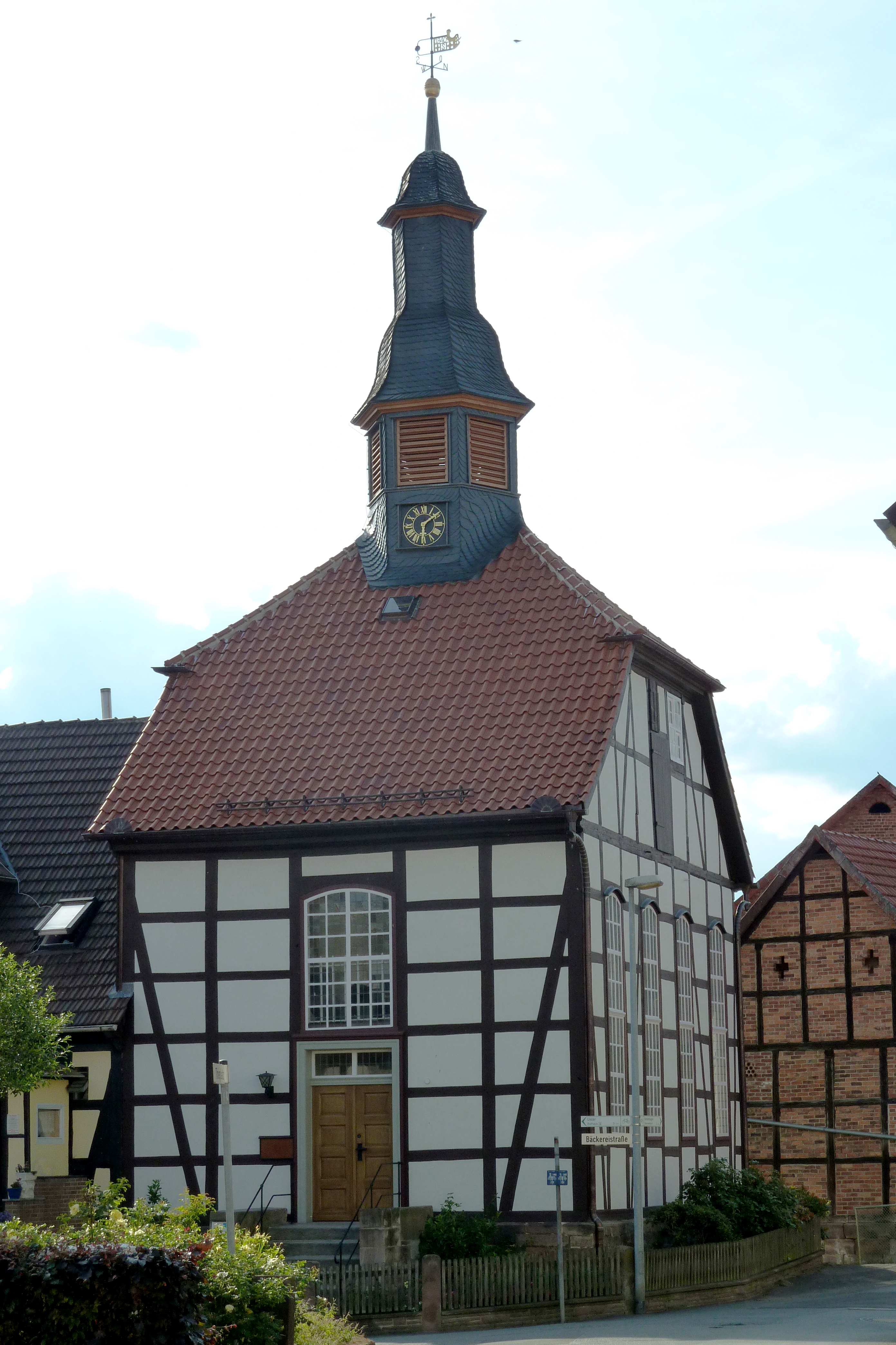 Ev.-luth. Kapelle in Sohlingen, Stadt Uslar, Niedersachsen. Fachwerkkapelle mit querliegendem Krüppelwalmdach mit mittigem Dachreiter. Segmentbogenfenster. Erbaut 1838/40, renoviert 1963 und 2007.